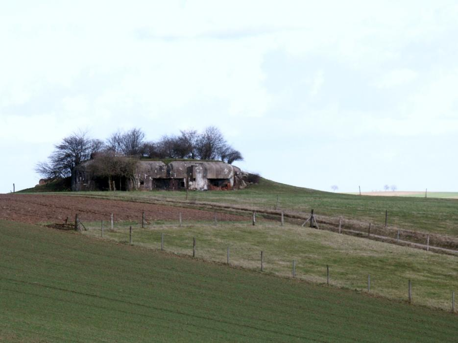 La casemate nord sur la commune d'Oberrœdern.